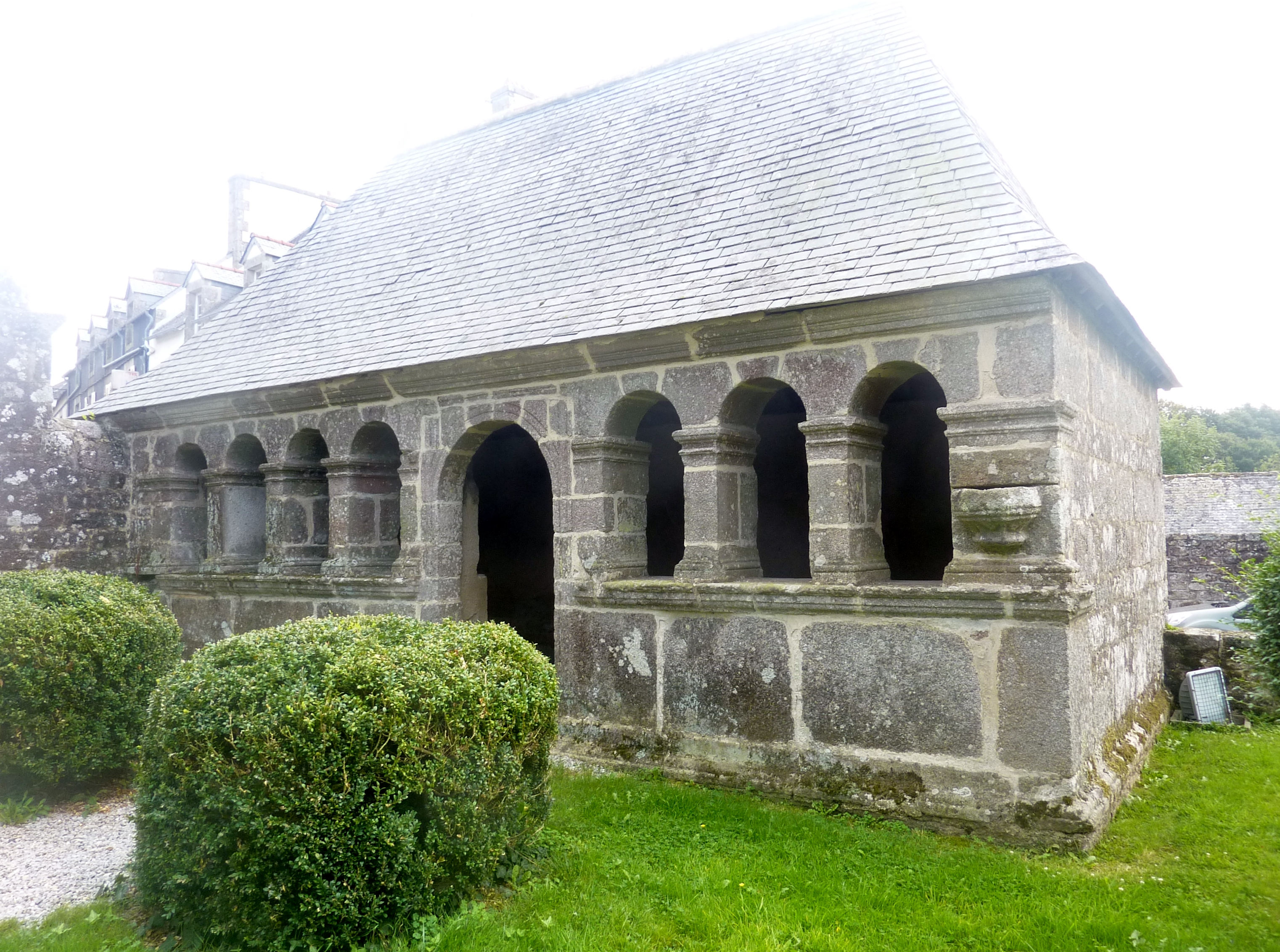 Ergué-Gabéric : l'ossuaire, datant du XVIIème siècle, situé sur le placître de l'église paroissiale Saint-Guinal